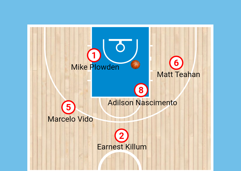 Possível melhor 5 de jogadores que passarem no FC Barreirense.